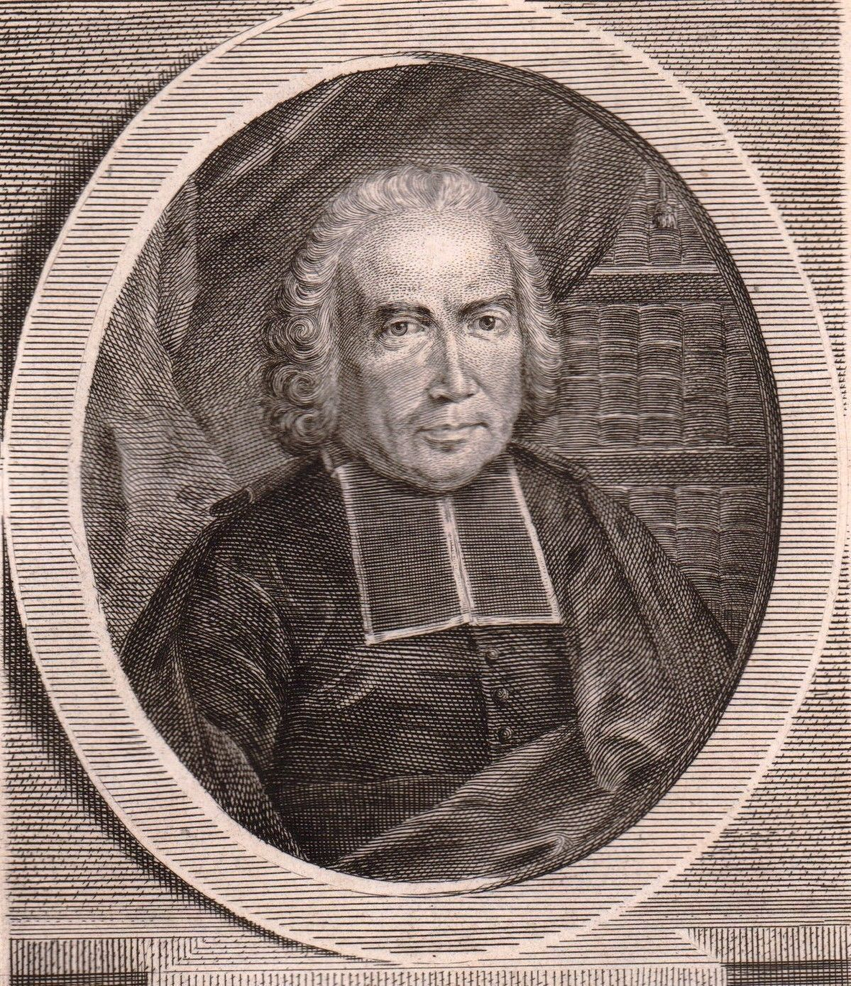 Abbé Jean Lebeuf (1687-1760), historien et érudit.